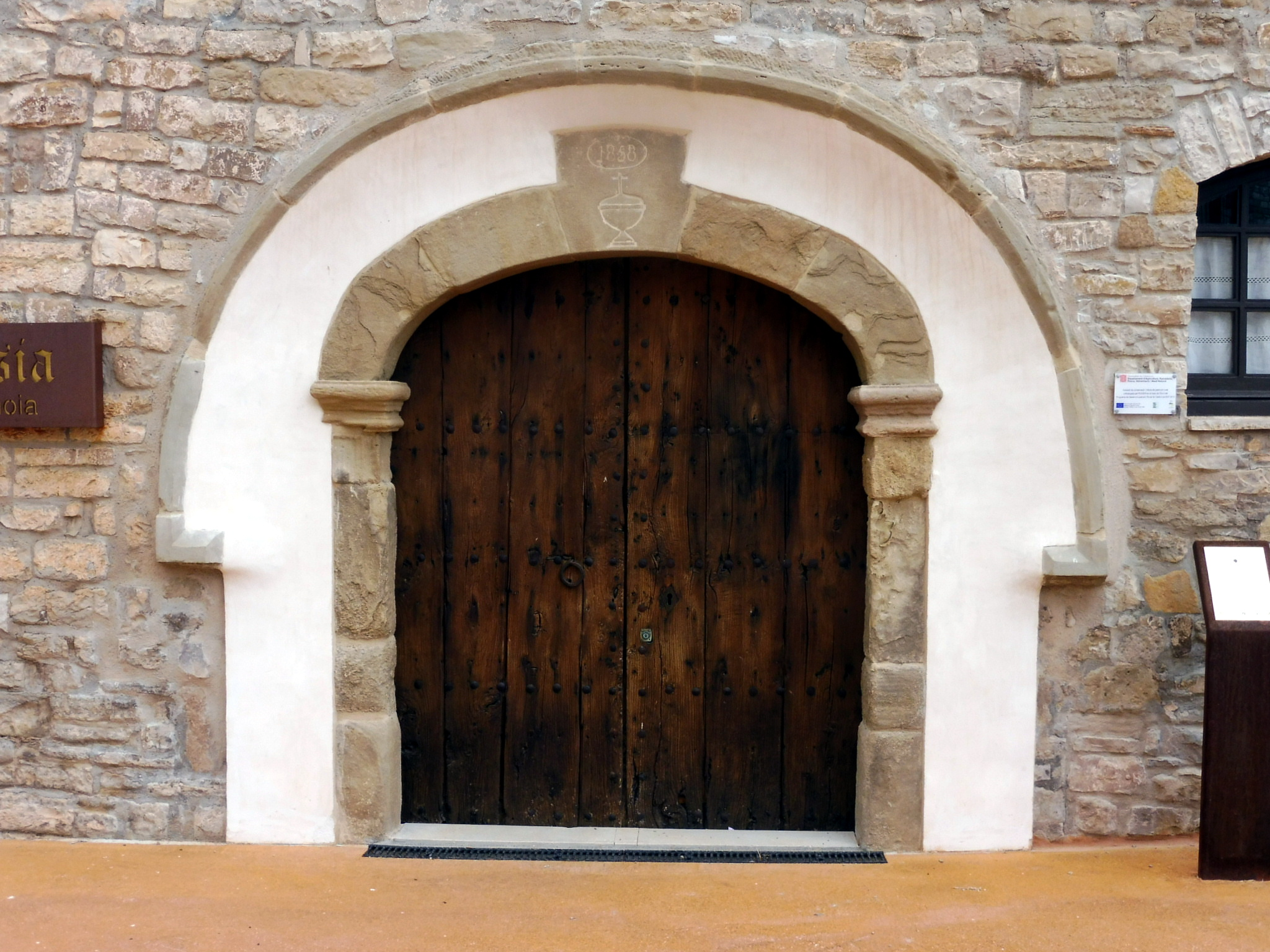 Església parroquial de Santa Maria de Segur (Veciana): portada